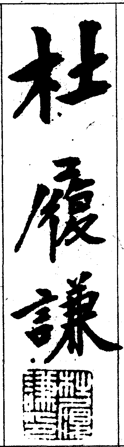 第一屆立法委員、制憲國民大會代表杜履謙的簽章